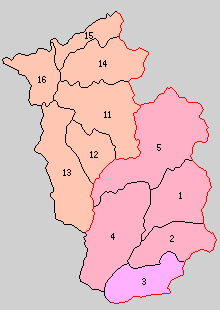 後の兵庫県美方郡域の町村制時点の町村。